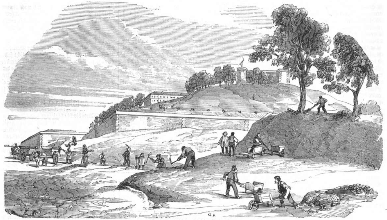 Das Fort Mont St. Valerien